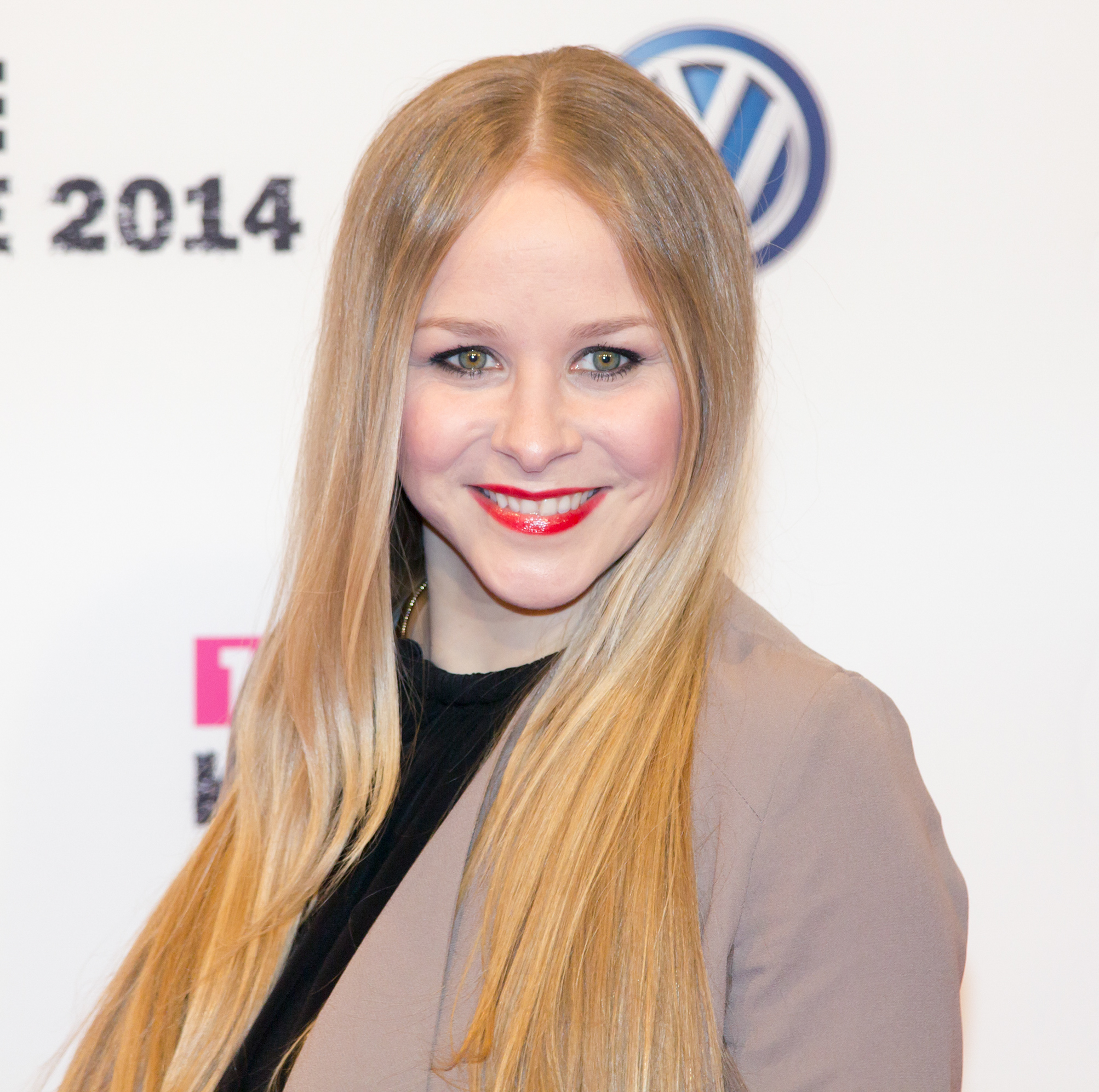 1LIVE Krone 2014 in der Bochumer Jahrhunderthalle: Jasmin Schwiers auf dem roten Teppich